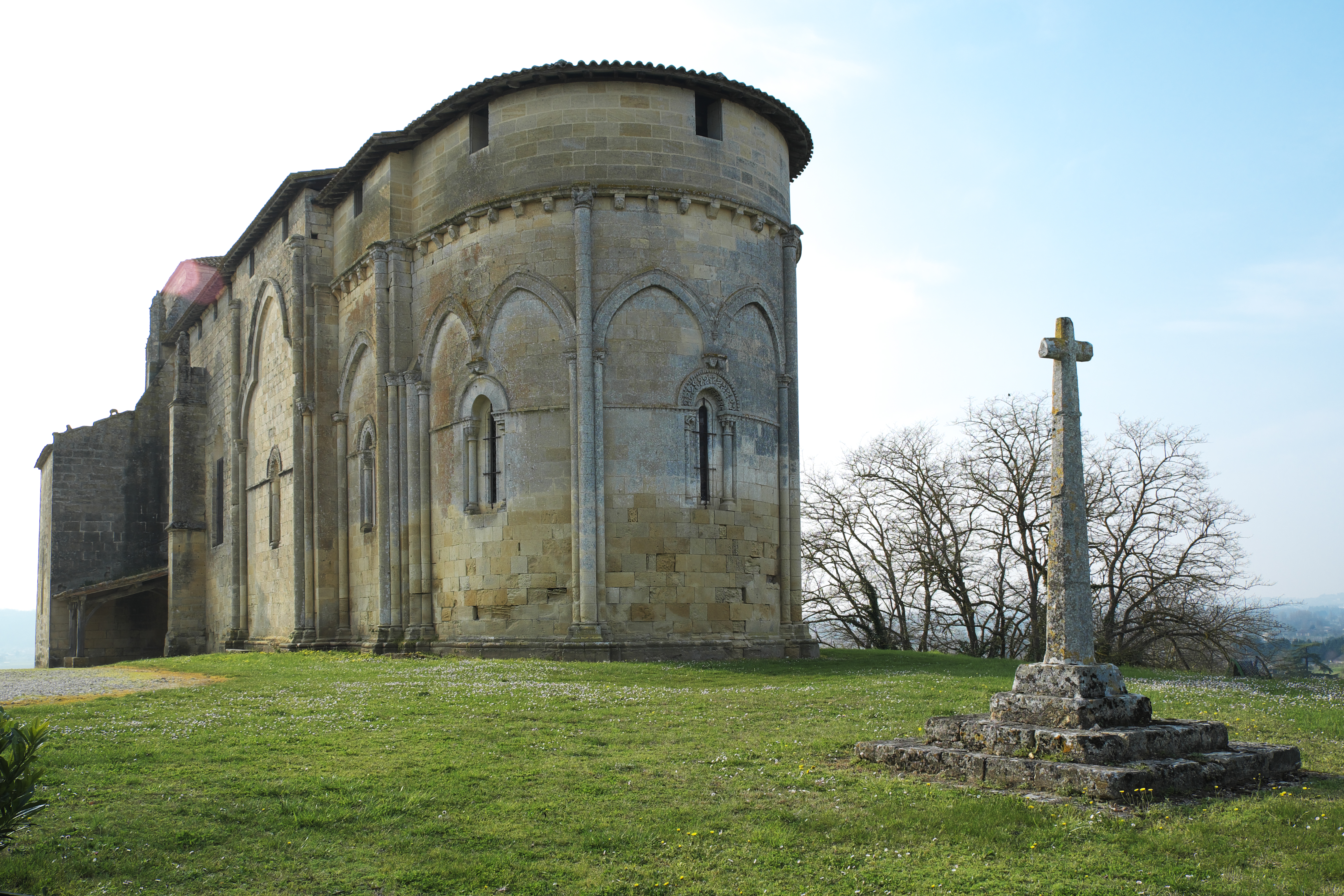 Kirche Saint-Pierre in Pujols (Gironde) im Département Gironde (Région Aquitaine/Frankreich), Ansicht von Osten